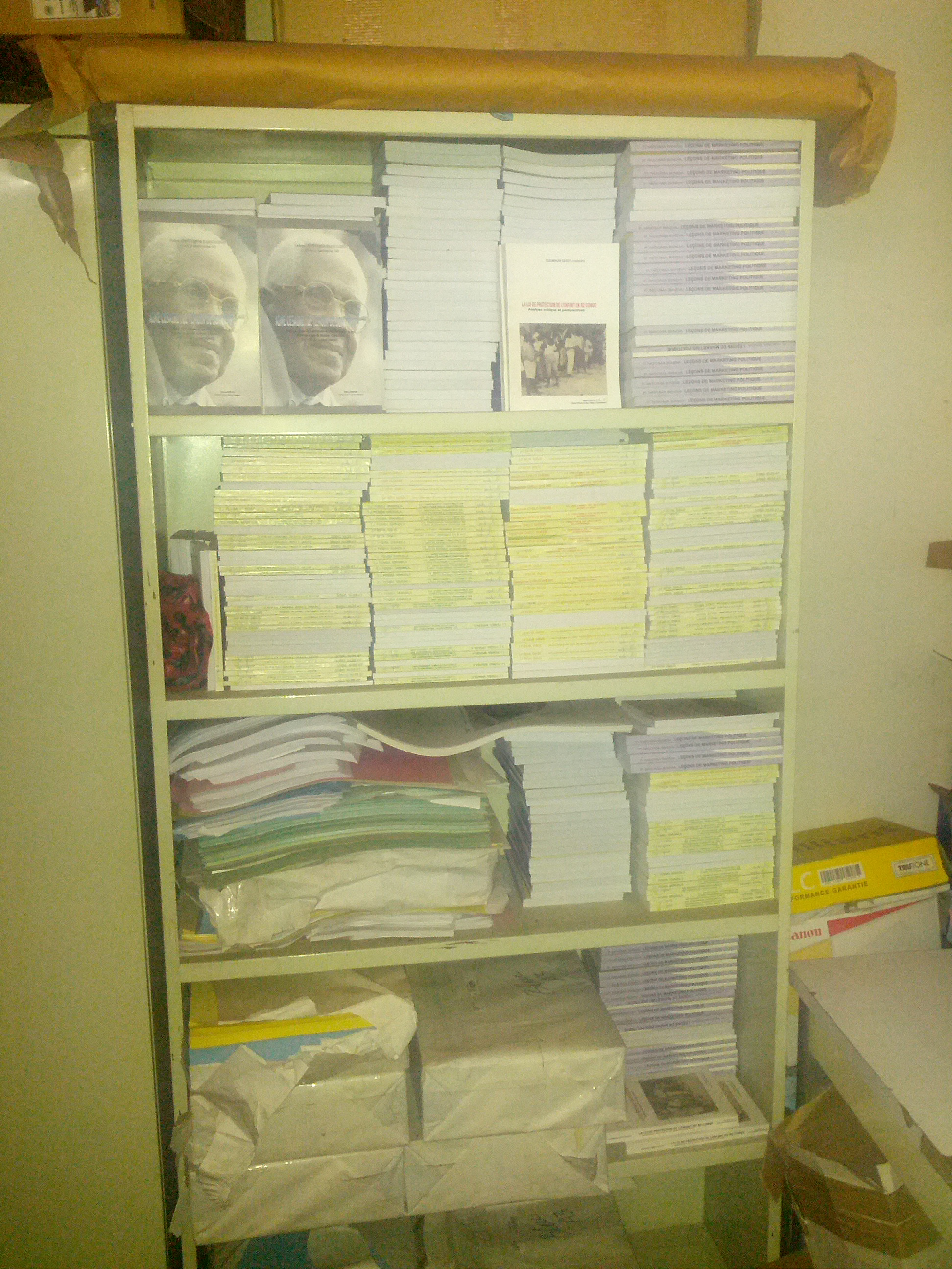 Publication du CEDESURK, Armoire contenant des publications scientifiques des enseignants des établissements Universitaires de la RDC